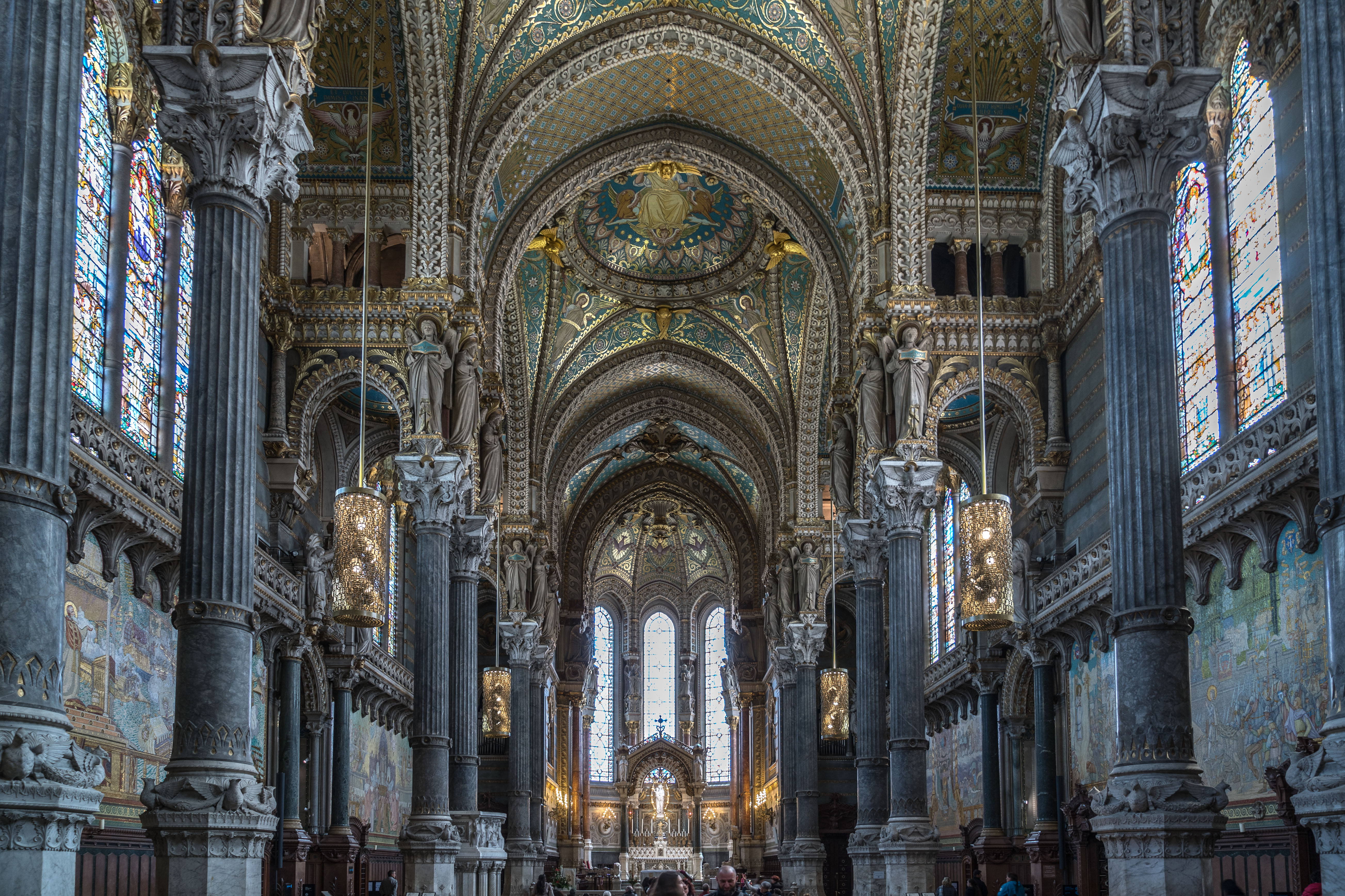 Lyon - Basilique de Fourvière - Nef